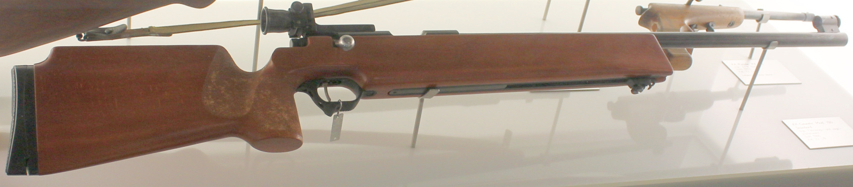 Kleinkaliber-Standardgewehr 150 im Waffenmuseum Suhl.